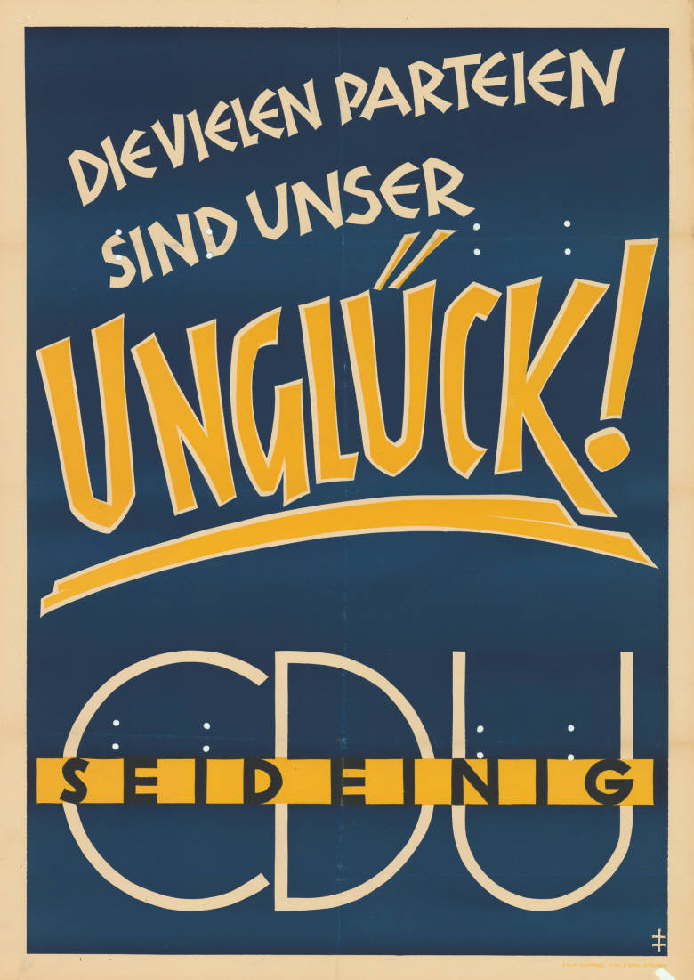 Die vielen Parteien sind unser Unglück! Seid einig CDU Plakatart: Textplakat Allgemein Künstler_Grafiker: Entwurf: Josef Hötiges Auftraggeber: B. Kühlen, M.Gladbach Objekt-Signatur: 10-009 : 211 Bestand: Landtagswahlplakate Nordrhein-Westfalen (10-009) GliederungBestand10-18: Landtagswahlplakate Nordrhein-Westfalen (10-009) » Landtagswahl am 18.6.1950 » CDU » Allgemein Lizenz: KAS/ACDP 10-009 : 211 CC-BY-SA 3.0 DE